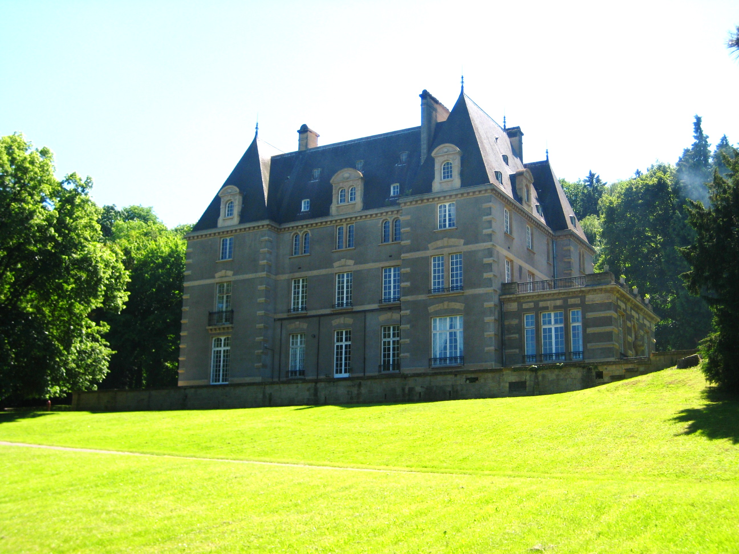 Description Château de Tournebride, Hayange — le Château Guy de Wendel, encore appelé le Château du Tournebride, a été construit en 1906 par Guy de Wendel (1878-1955), fils de Robert de Wendel (1847-1903). Voyez cet article. Date22 May 2009Sourcemon appareil photoAuthorAimelaime Château de Tournebride, Hayange — le Château Guy de Wendel, encore appelé le Château du Tournebride, a été construit en 1906 par Guy de Wendel (1878-1955), fils de Robert de Wendel (1847-1903). Voyez cet article.